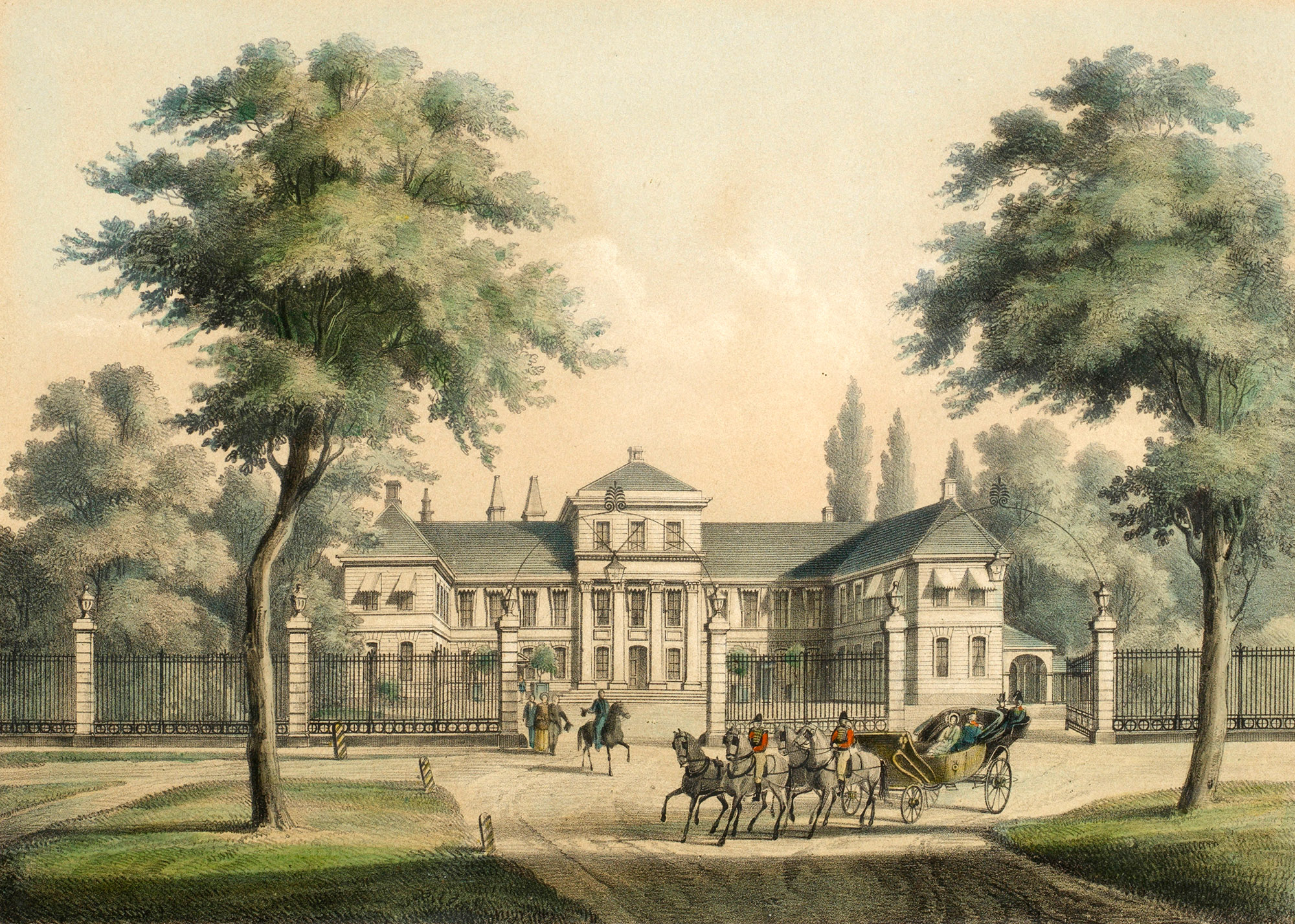 Hannover, Schloss Monbrillant, kolorierte Lithographie, um 1850